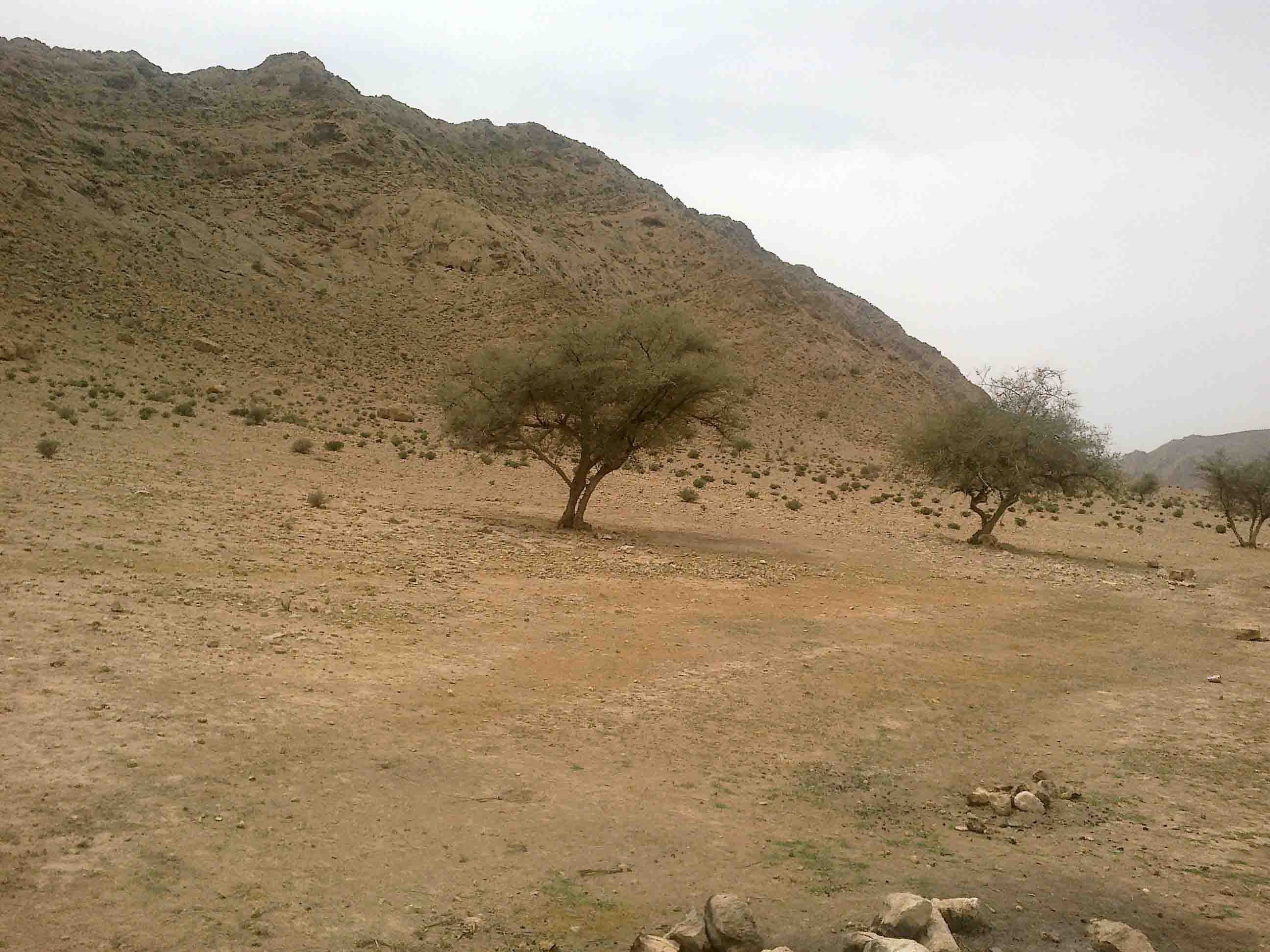 منطقه تفریحی تنگه حاجی‌آباد-نمای کوهپایه